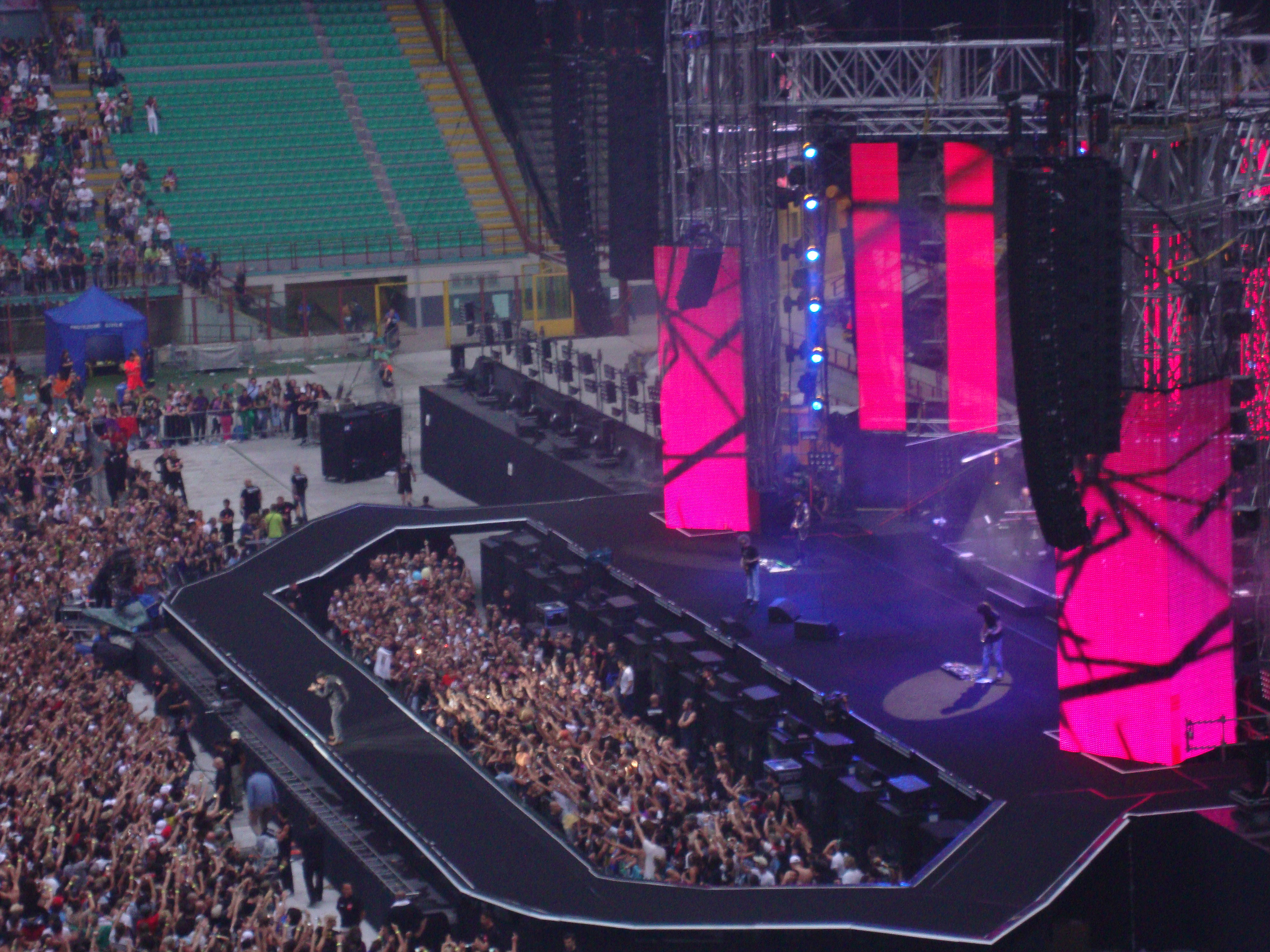 Vasco Rossi Live Kom 2011 Tour San Siro, Milano Italia